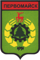 Герб Первомайска утверждён в июле 1981 года. На зеленом щите венок из колосьев, внизу которого дата "1951", в его середине разомкнутая шестерня, а в её центре ель, вверху нижегородский олень.